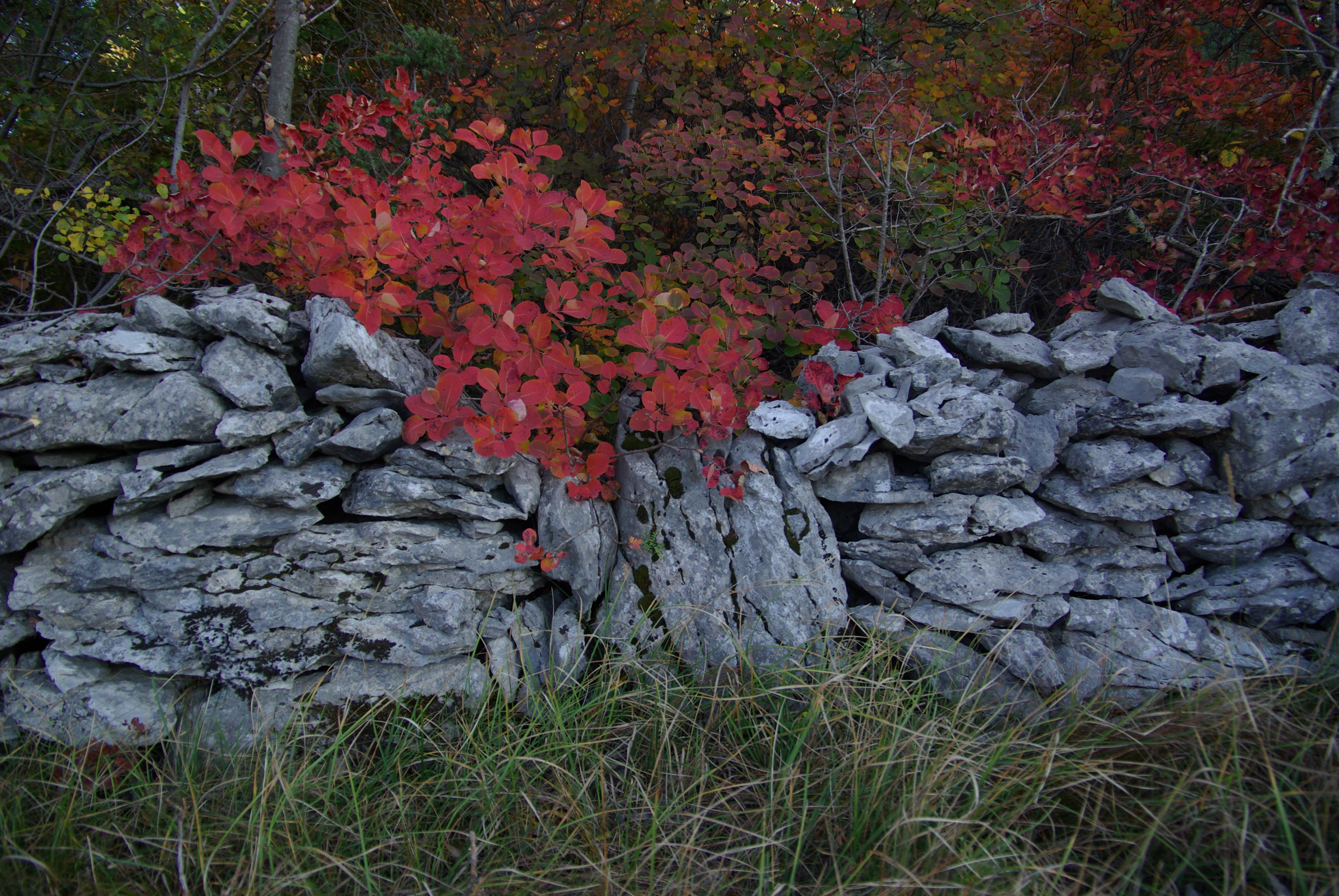 Kraški suhi zid